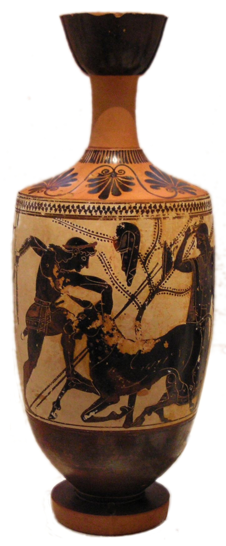 Lekythos à fond blanc, provenant d'Érétrie, vers 500 av. J.-C. Thésée et le taureau de Marathon, par le peintre d'Édinburg. Musée archéologique national, Athènes, n°1124.